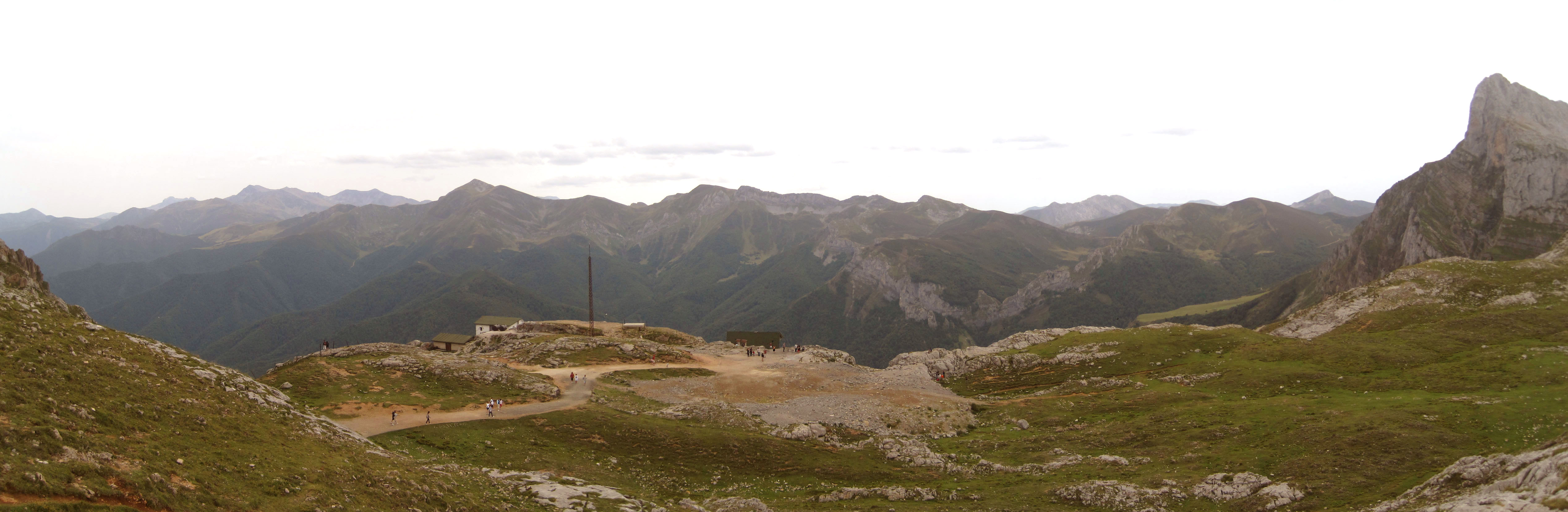 Vista desde el mirador de Fuente Dé, Cantabria, España, en la que se observan los picos de Peña Prieta y Coriscao.